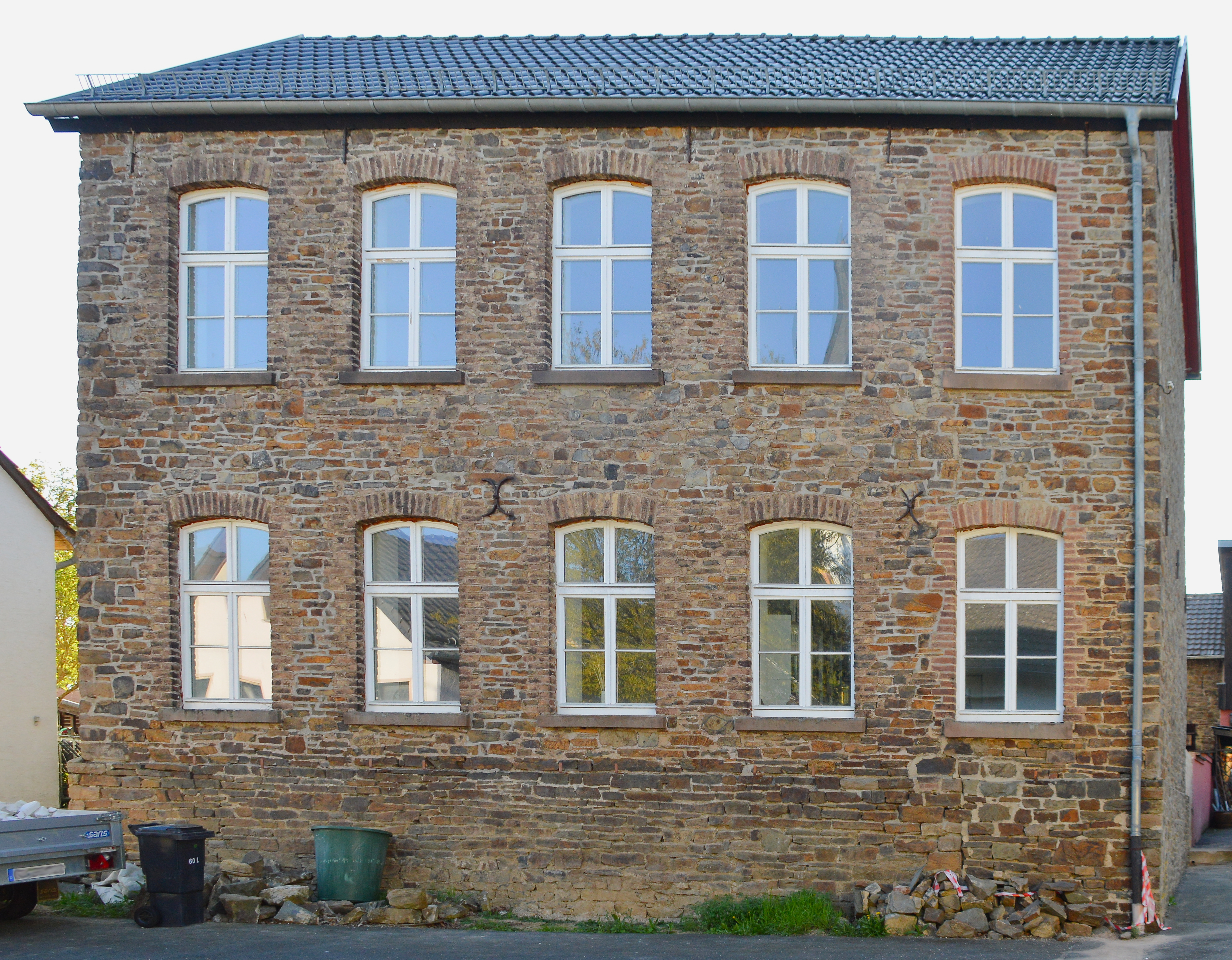 Altes Schulgebäude in Mutscheid (Bad Münstereifel) 2019